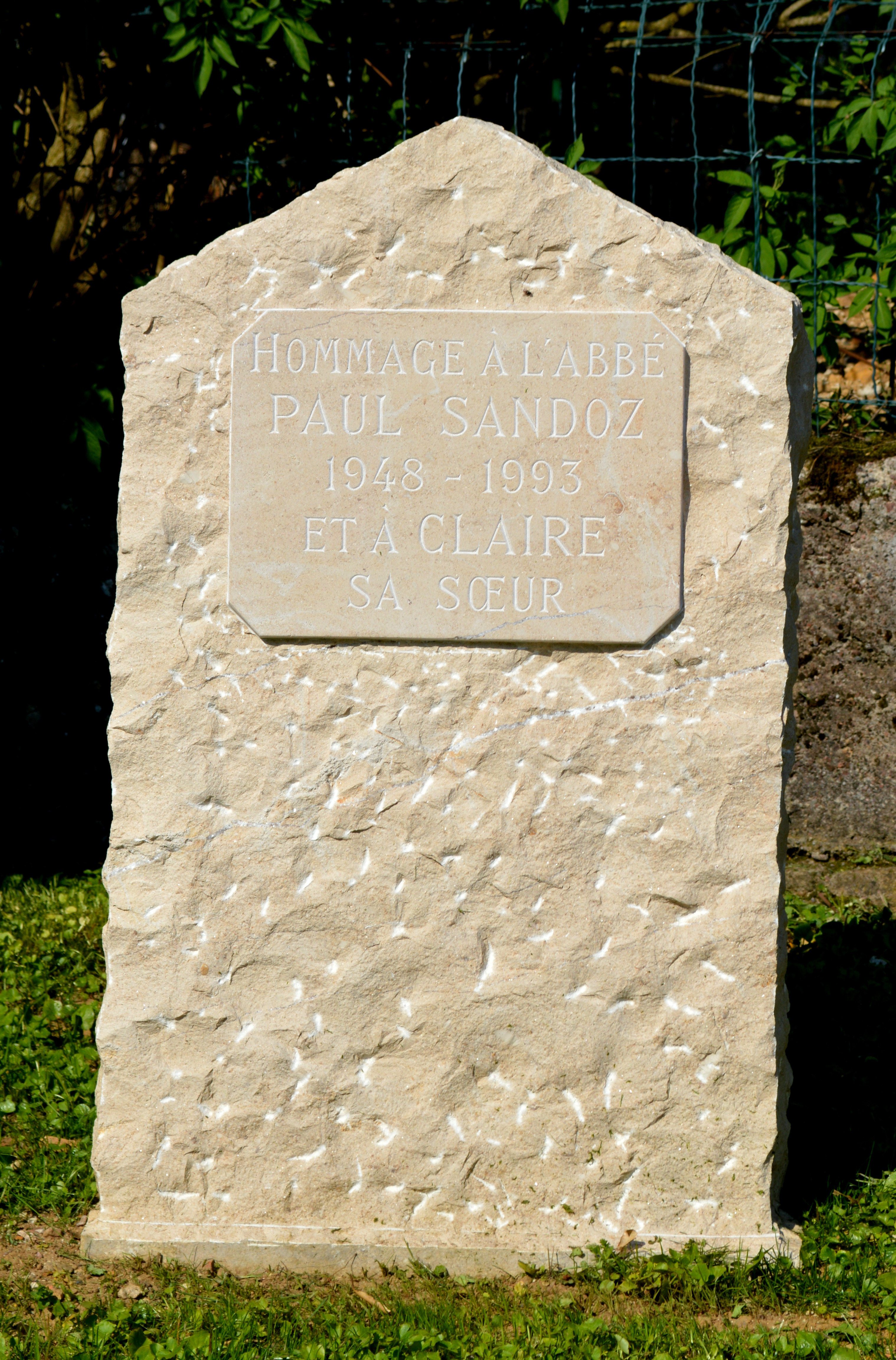 Stèle en mémoire de l'abbé Paul Sandoz et de sa sœur Claire, située sur la place du village de Noironte, dans le département du Doubs.